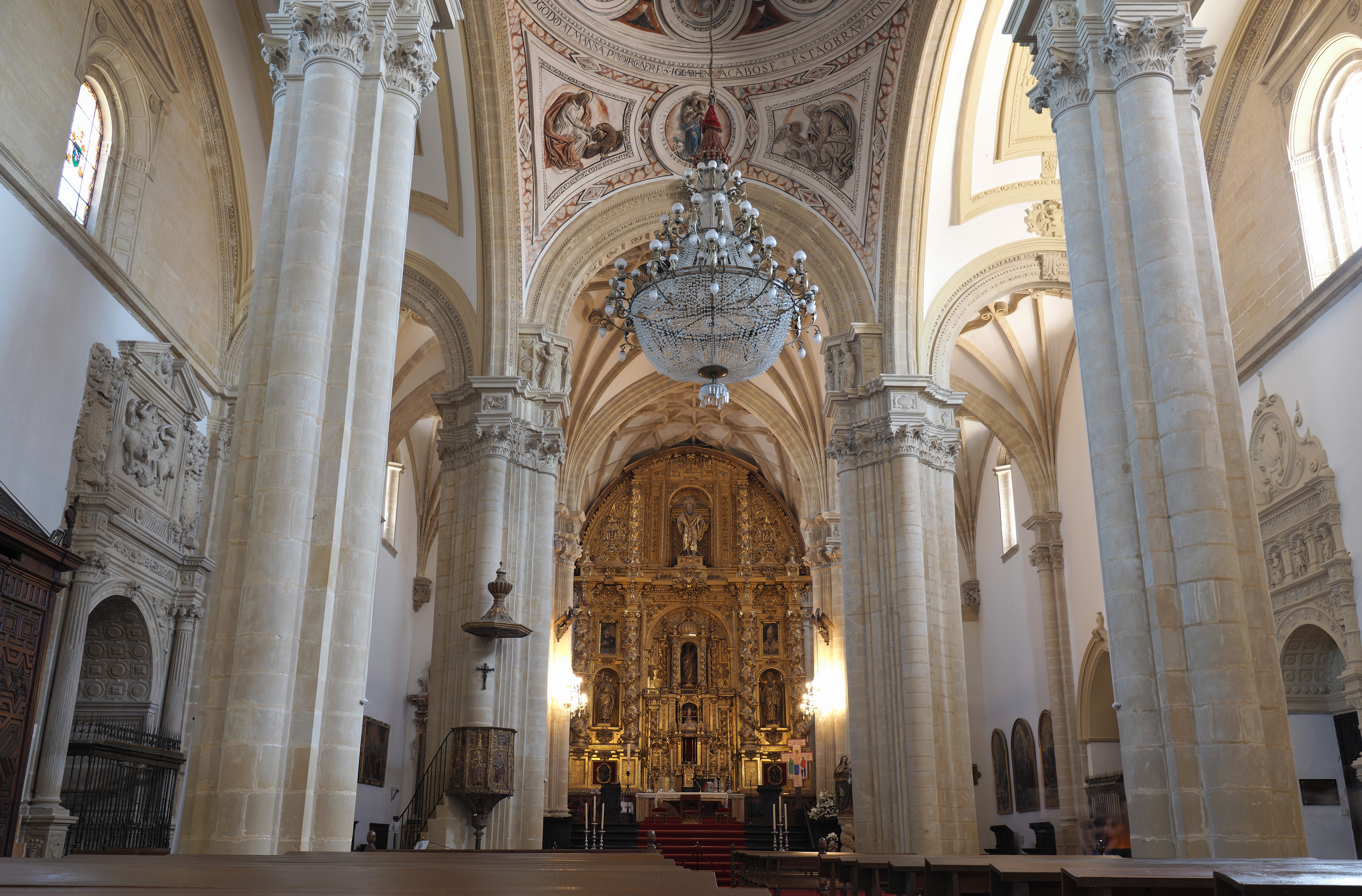 Innenausstattung der Kirche Catedral de la Natividad de Nuestra Señora in Baeza, Andalusien, Spanien. Mittelschiff